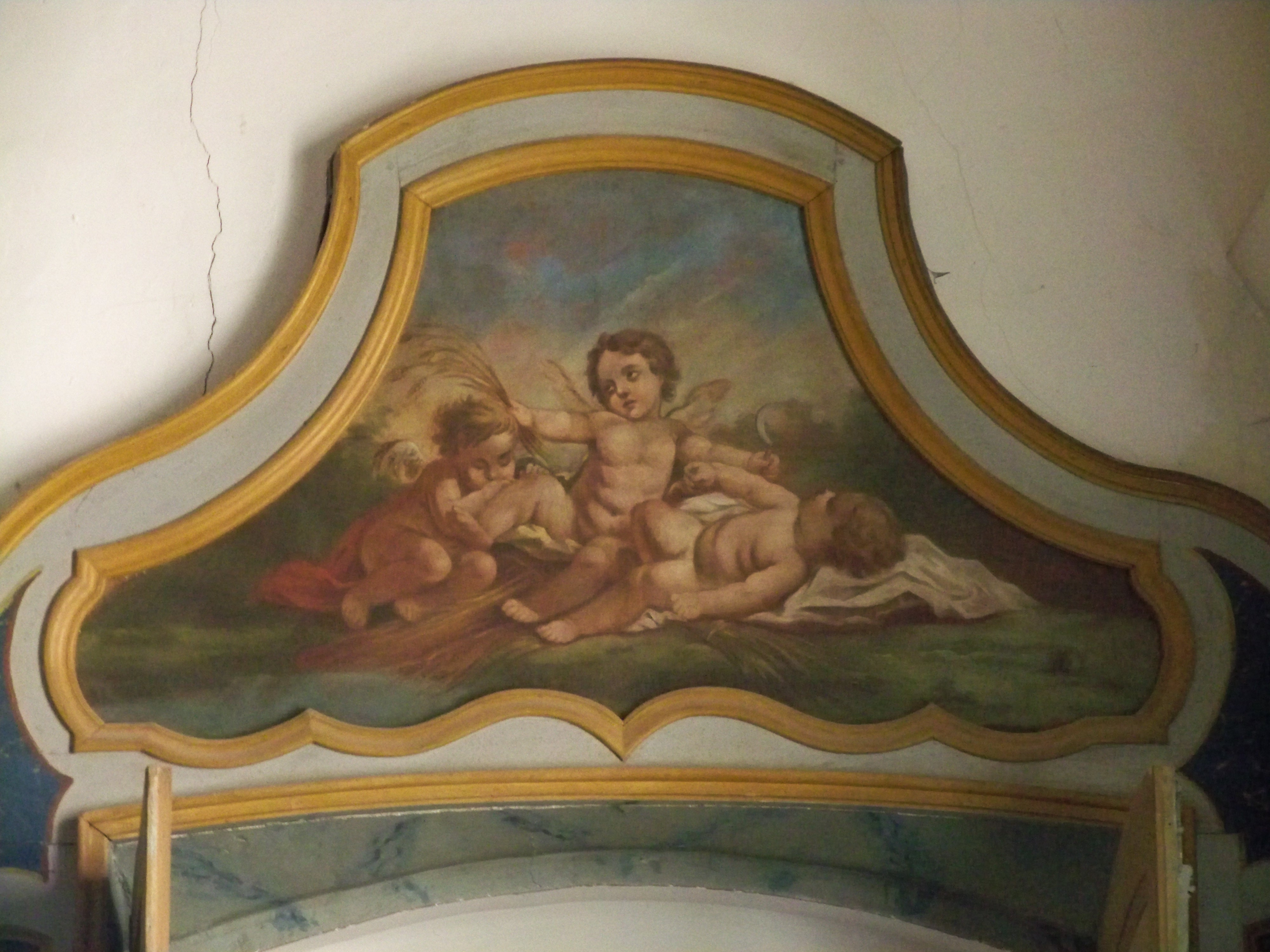 Décor de la pharmacie de l'hôtel dieu de Carpentras, peint par Joseph Siffred Duplessis